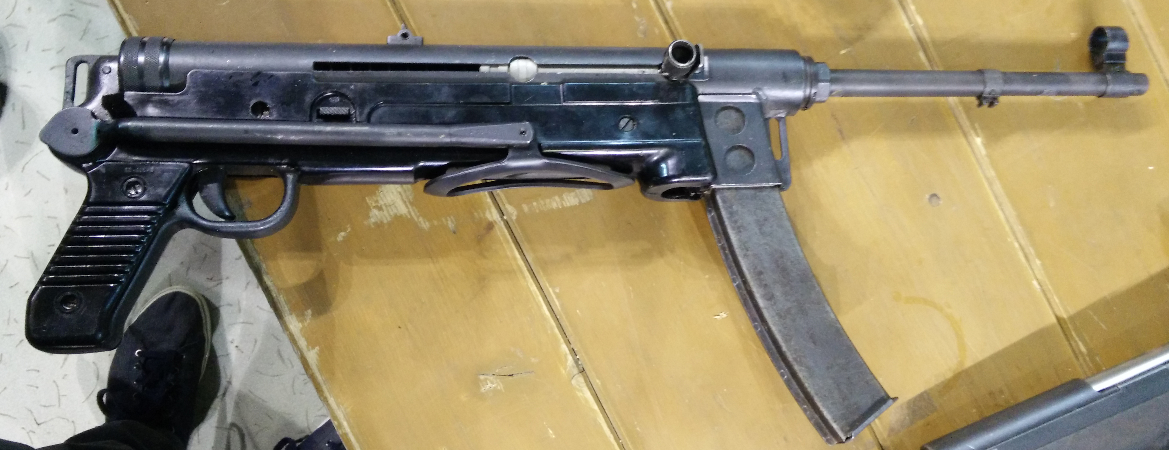 Jugoslovanska brzostrelka M56.